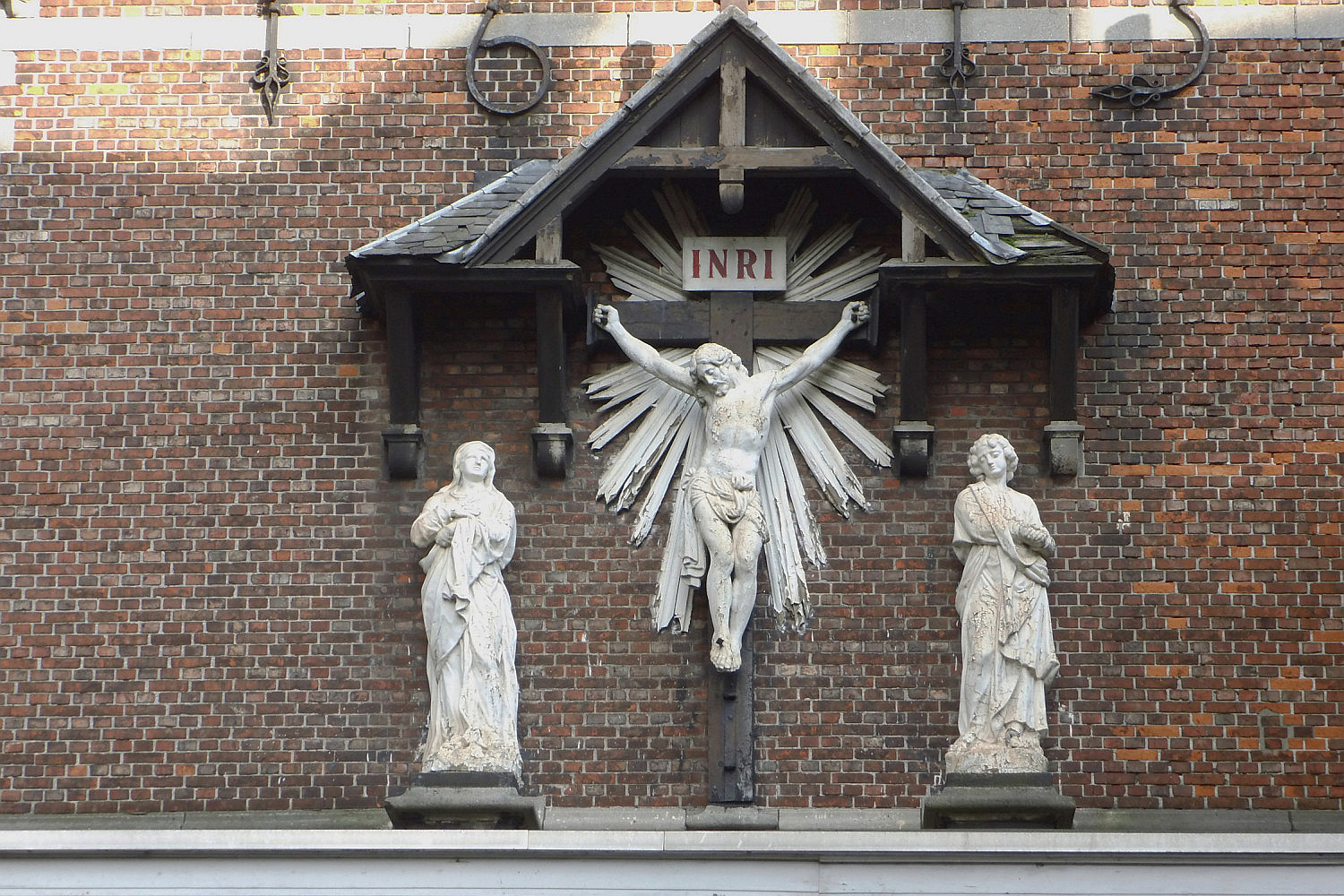 Sint-Antonius van Paduakerk (Antwerpen) - Jaartalankers en Kalvariegroep